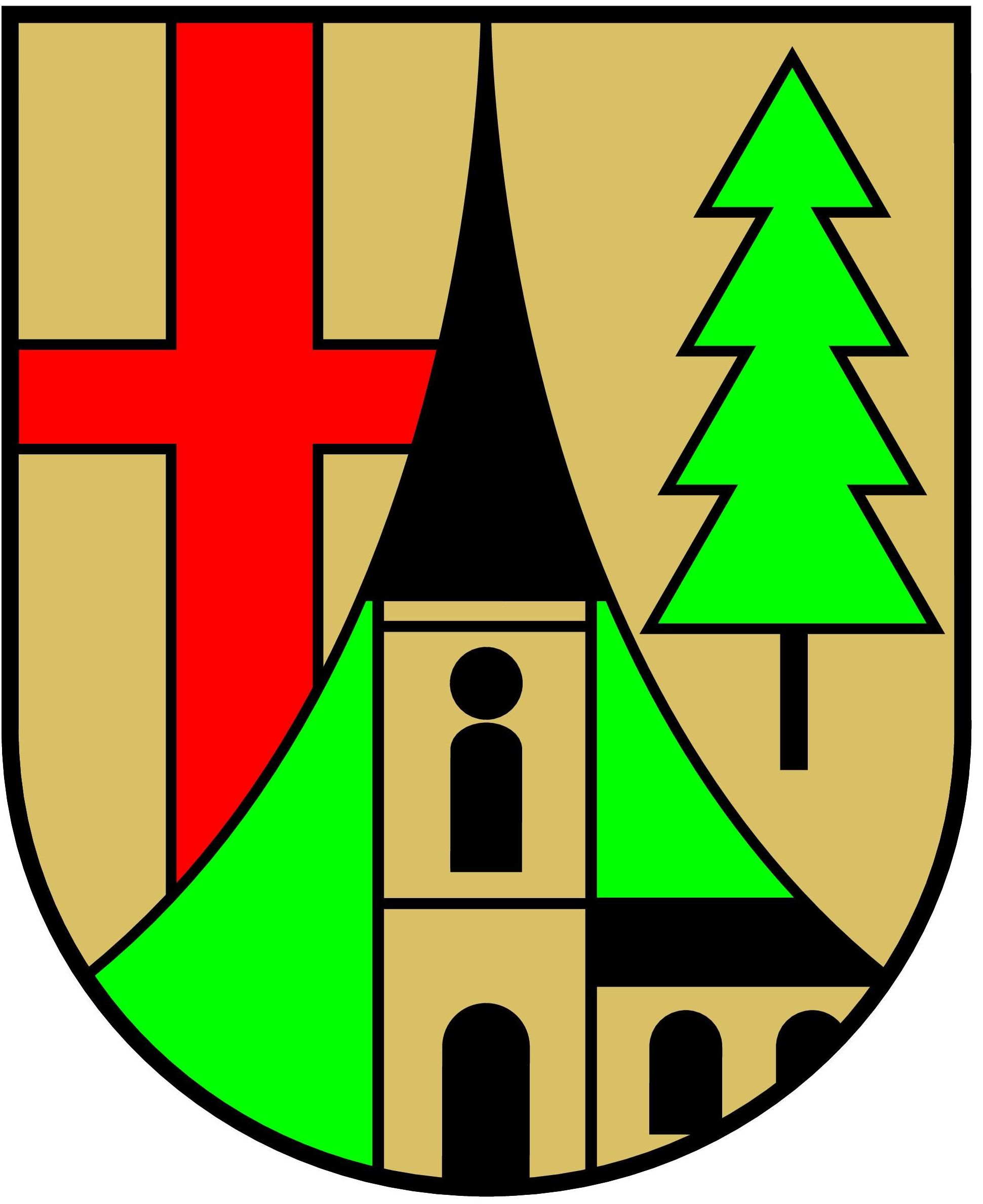 Bedeutung des Wappens der Gemeinde Farschweiler In Gold eine eingeschweifte schwarze Spitze, darin wachsend eine goldene Kirche mit schwarzen Fenstern, deren Dach und Turmhelm im linken und oberen Teil der Spitze dargestellt sind; vorne ein durchgehendes rotes Kreuz, hinten eine schwarze Tanne. Wappenbegründung Die überörtlich bekannte Wallfahrtskirche "Mariae Heimsuchung" ist neben dem kurtrierischen Kreuz Ausdruck der besonderen Verbundenheit der Ortsgemeinde Farschweiler mit Kirche und Staat. Die Tanne symbolisiert den Waldreichtum der Gemeinde in gesunder Natur.